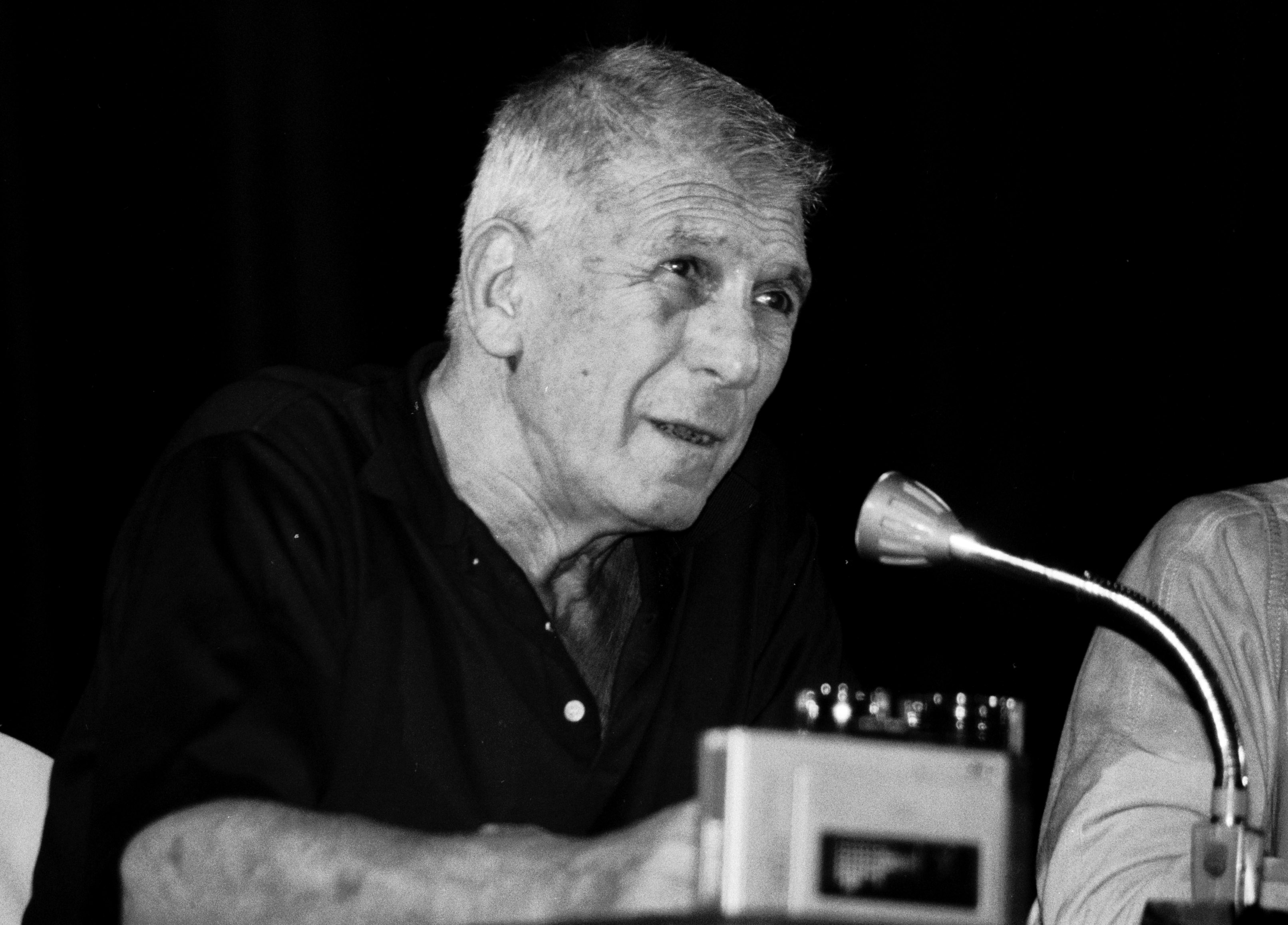 Le réalisateur américain Richard Brooks au Festival du cinéma américain de Deauville (Normandie, France) en septembre 1986.